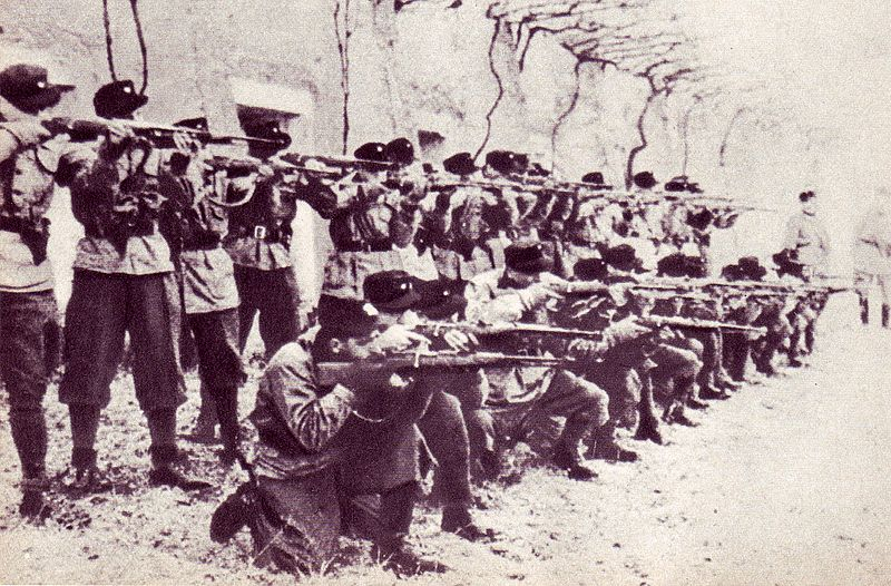 Il plotone di esecuzione dei firmatari dell'Ordine del giorno Grandi